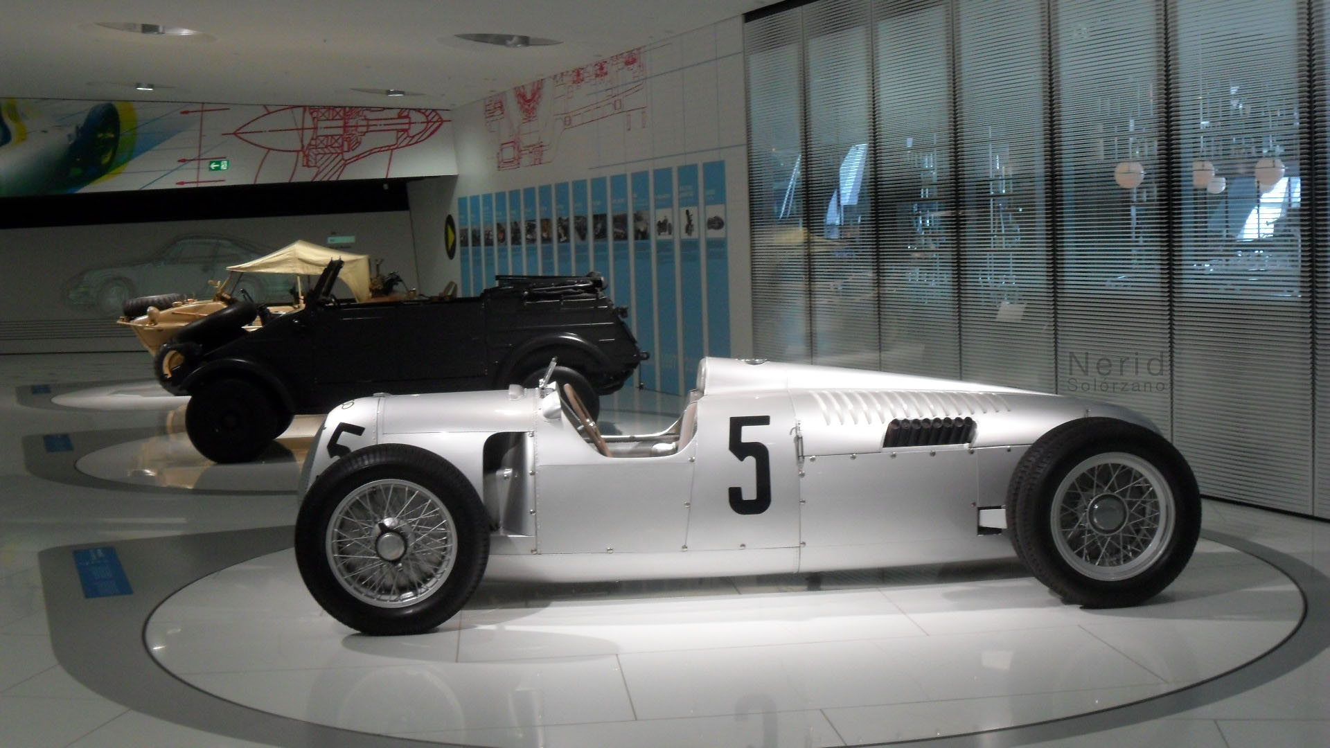 Porsche OF V